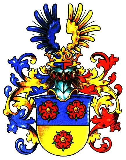 Wappen der Freiherren von Esebeck (Stammwappen, seit ca. 12./13. Jh., kommt auch mit schwarzem Flug vor)